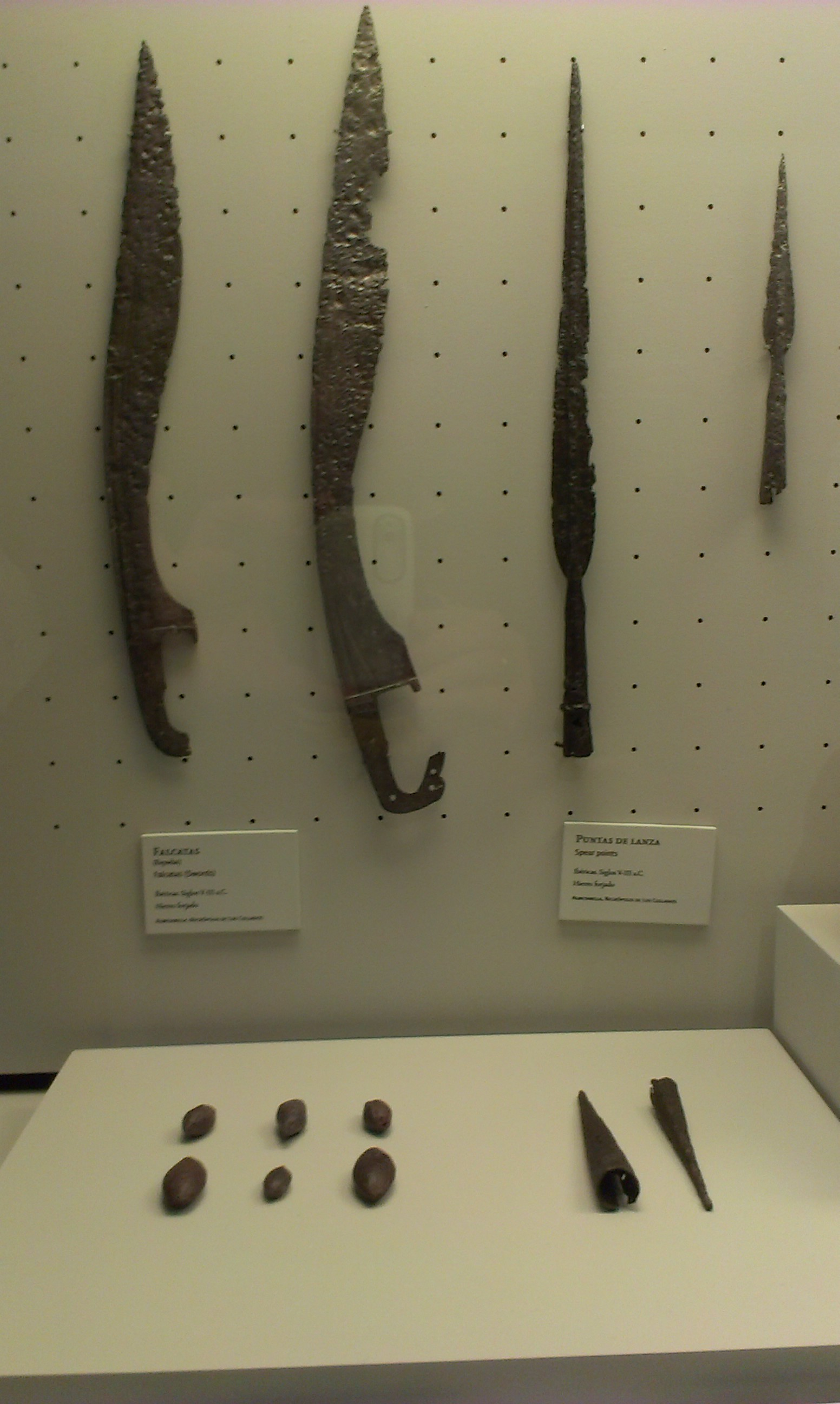 Falcatas y puntas de lanza. Museo Arqueológico y Etnológico de Córdoba (España).